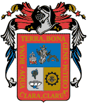 Escudo del Estado Mexicano de Aguascalientes (México)